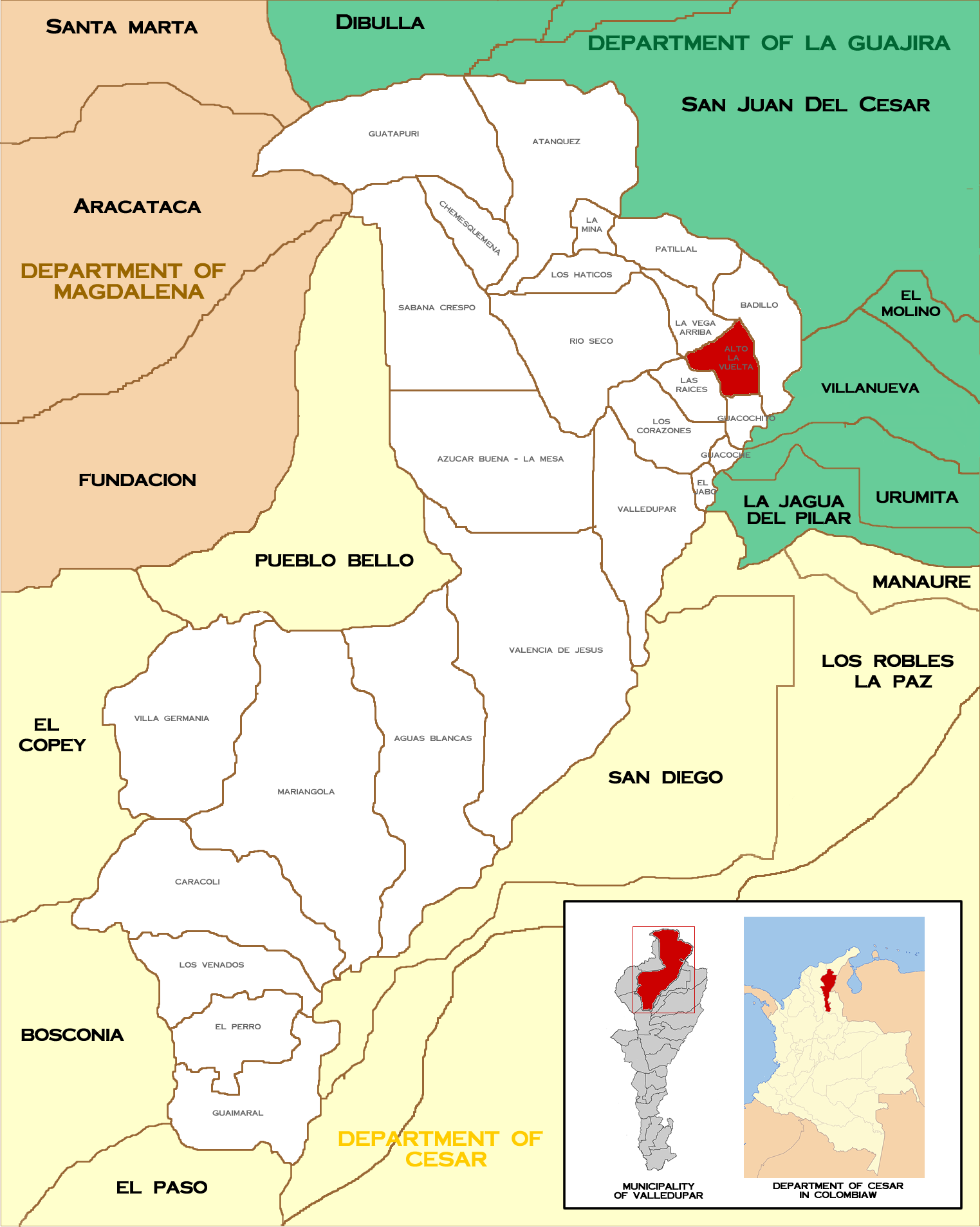 Map of Corregimientos of Valledupar, Alto la Vuelta